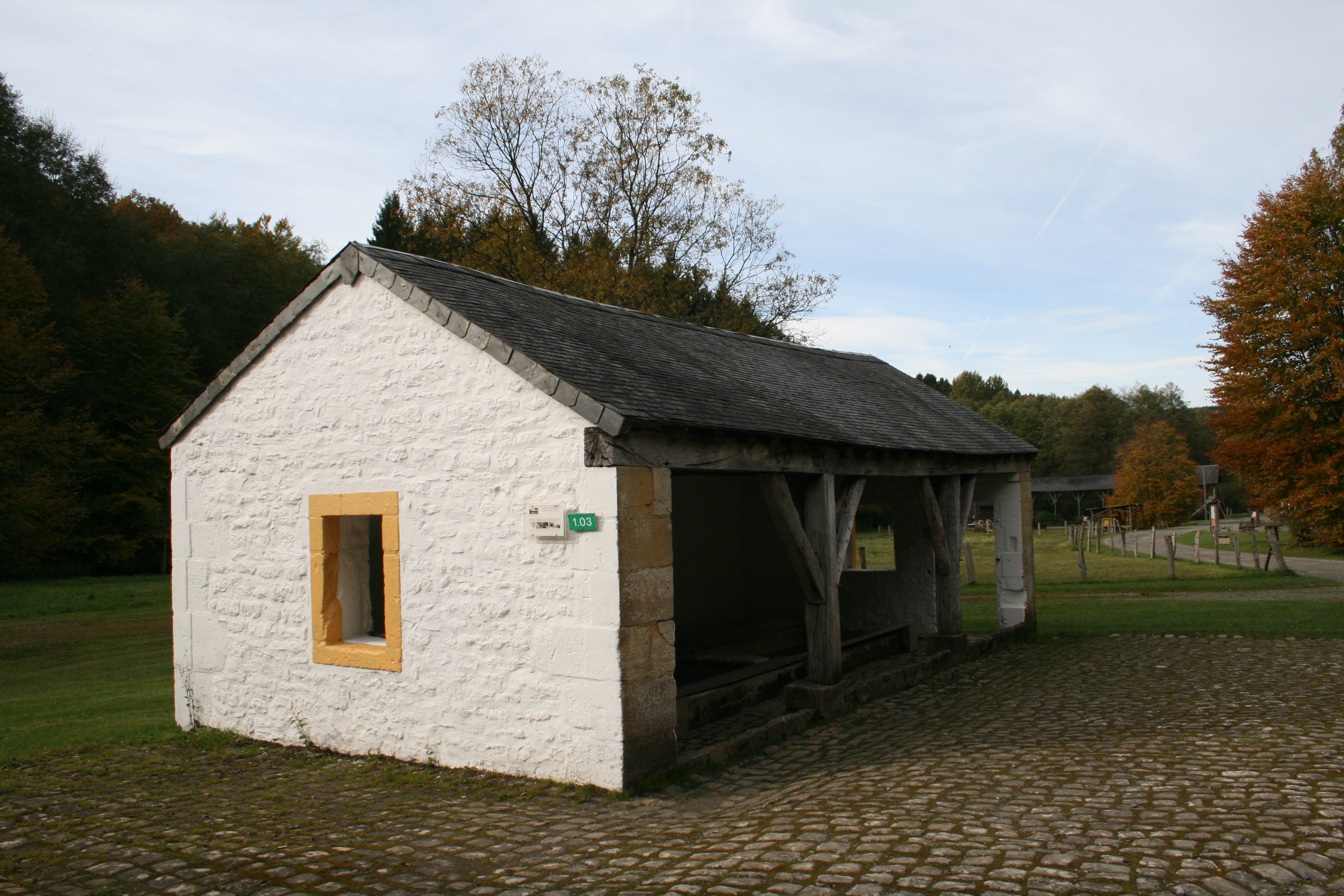 Ancien lavoir de Saint-Remy (fin du XIXe siècle) - Domaine du Fourneau Saint-Michel – Musée de la Vie Rurale en Wallonie à Saint-Hubert (Belgique).